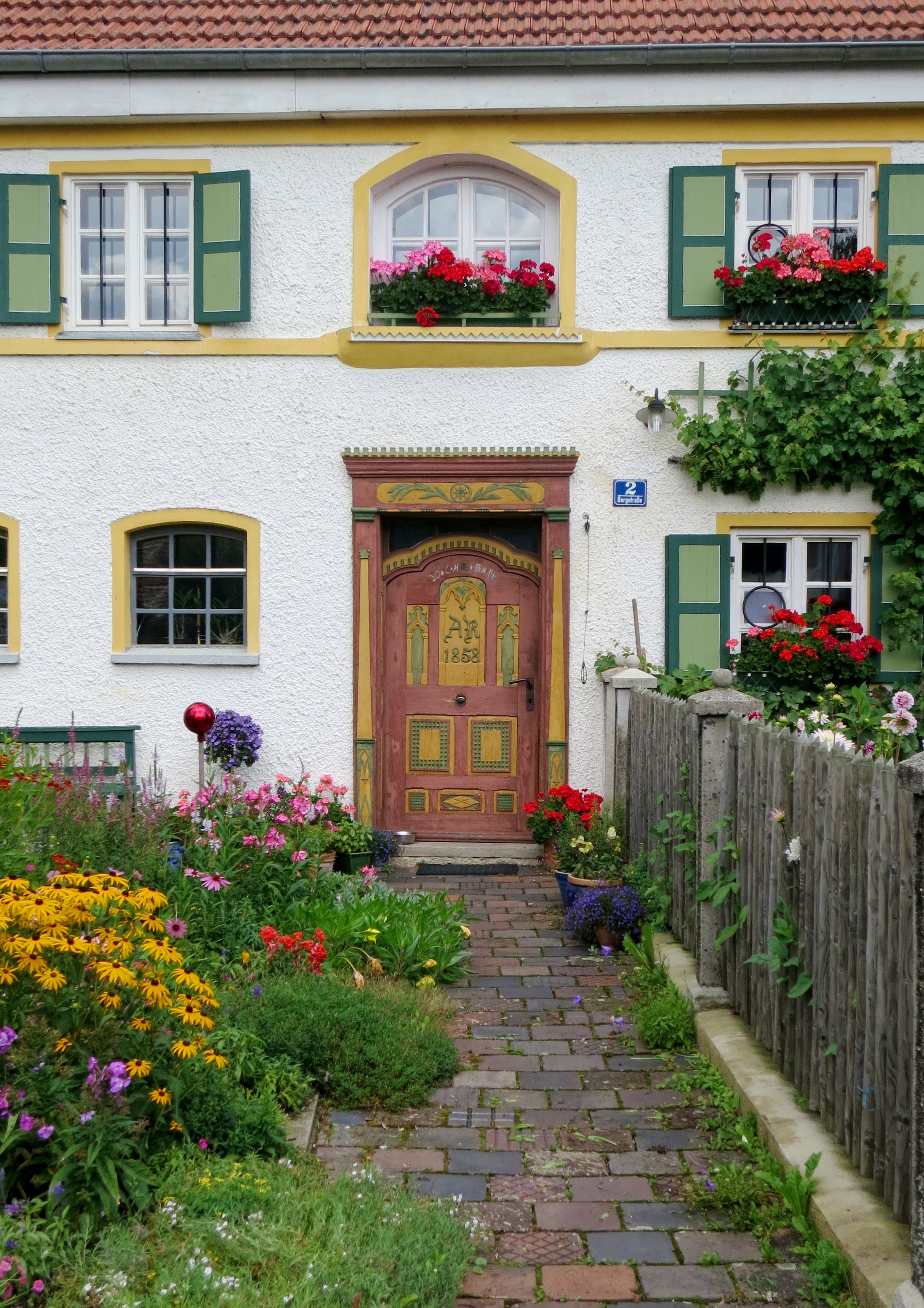 Ehemaliges Bauernhaus in Jesenwang - Blick über den Vorgarten zur Haustüre